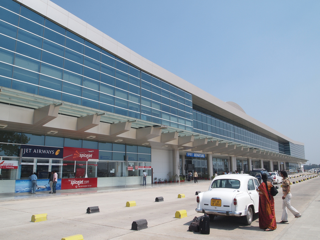 varanasi airport